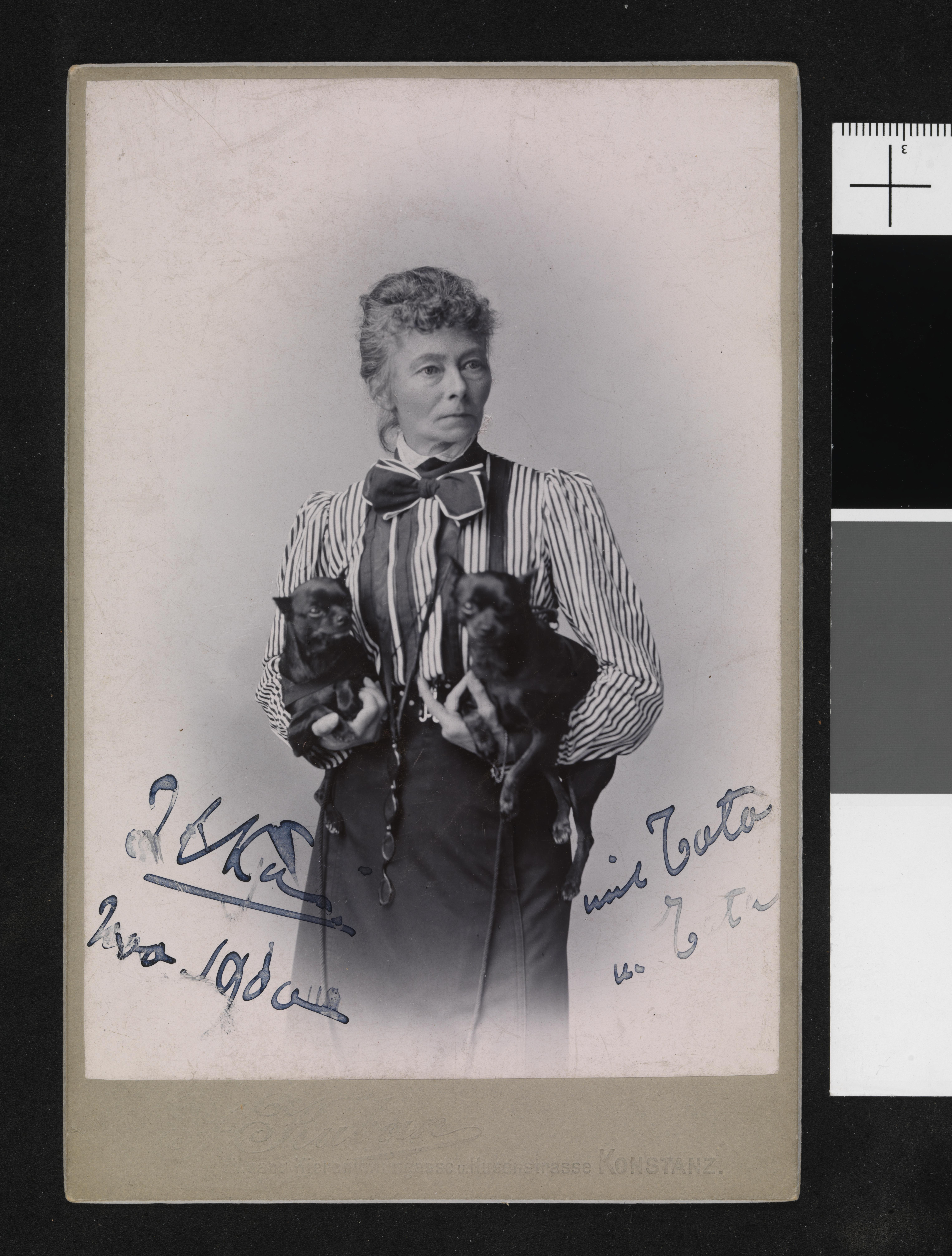 Bildet er hentet fra Nasjonalbibliotekets bildesamling Depicted person: Fabrice, Ilka Freiin von